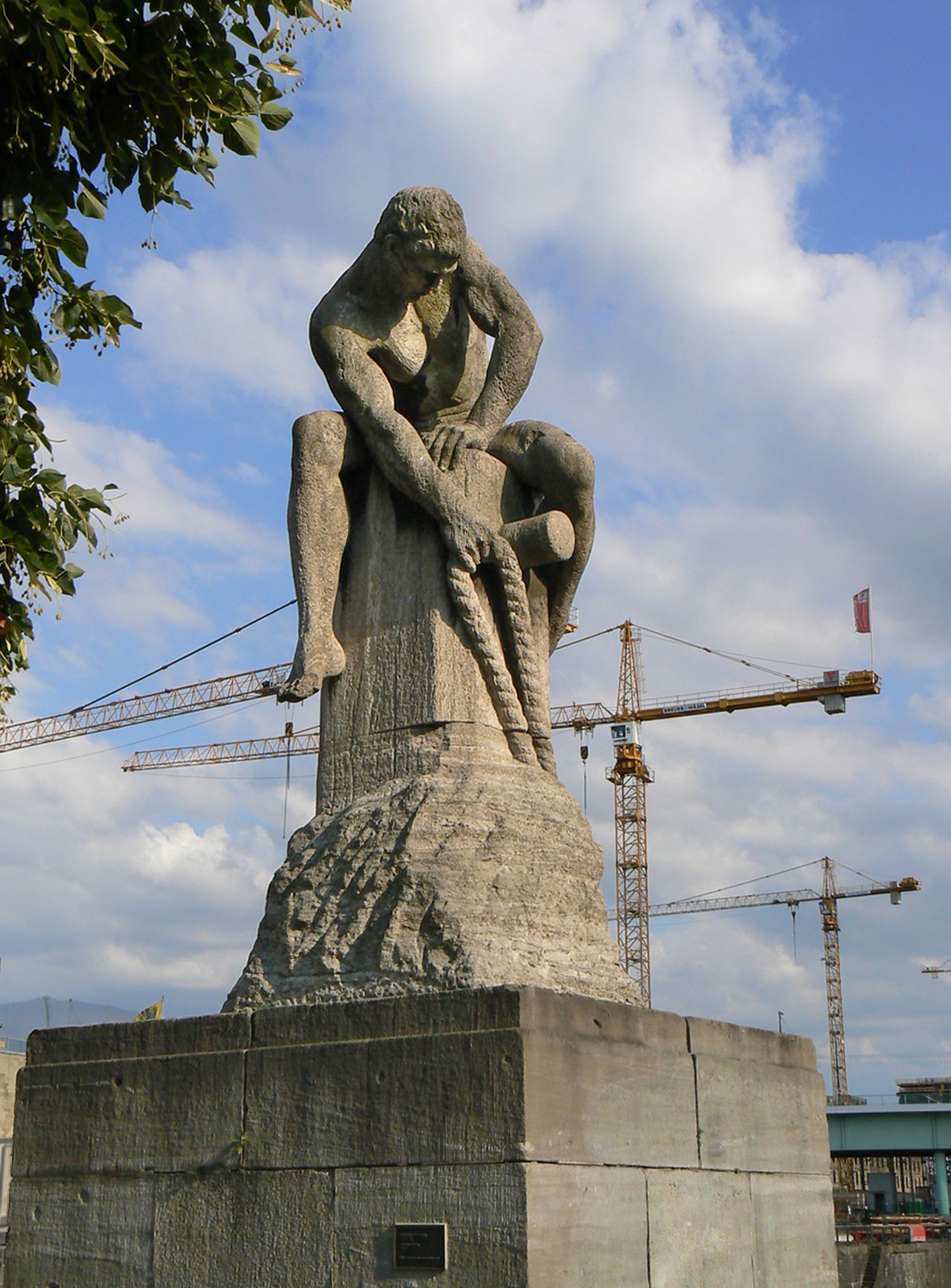 Skulptur Der Tauzieher von Nikolaus Friedrich (1908) am Rheinauhafen in Köln.